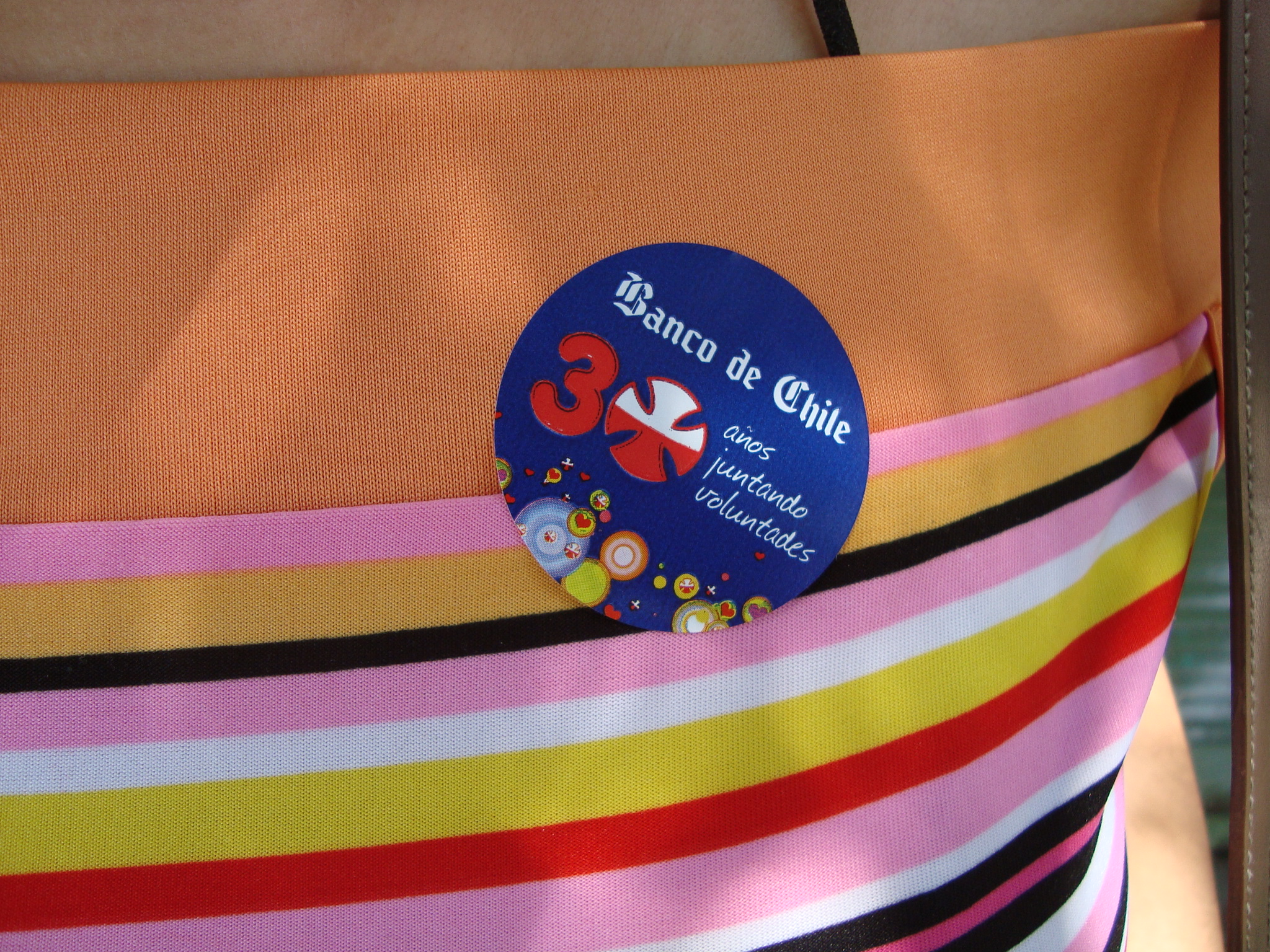 Distintvio de la Teletón 2008, agradeciendo el aporte realizado a la institución.